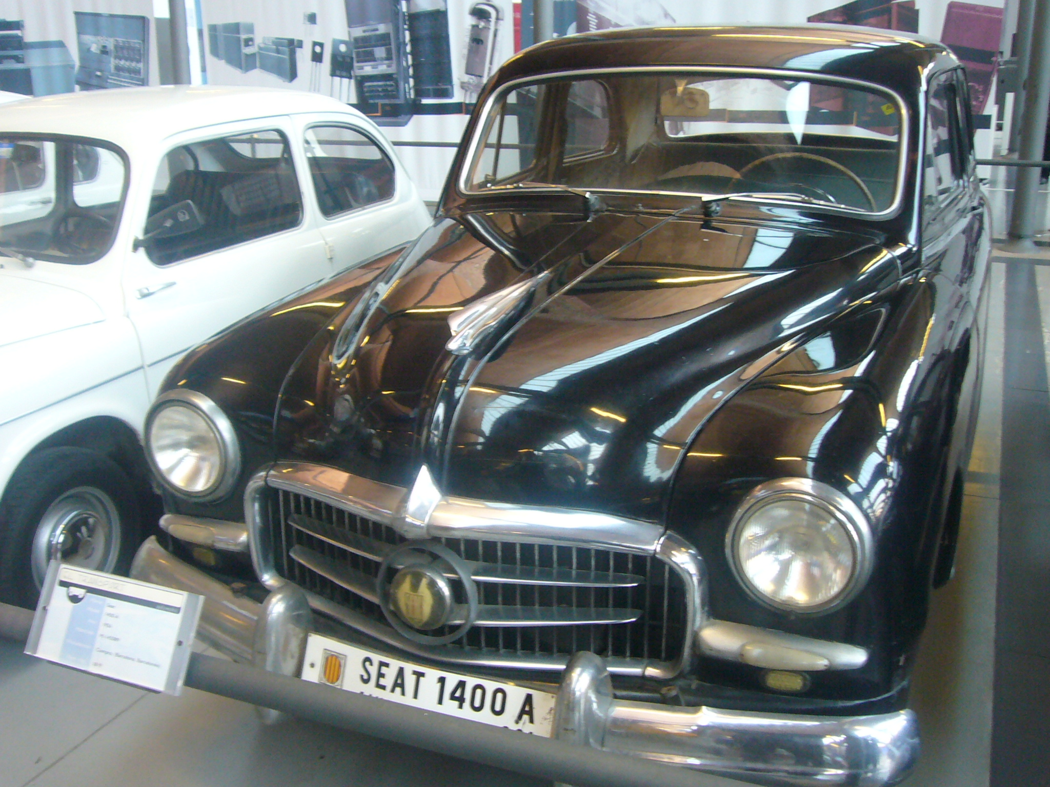 Seat 1400A al mnactec